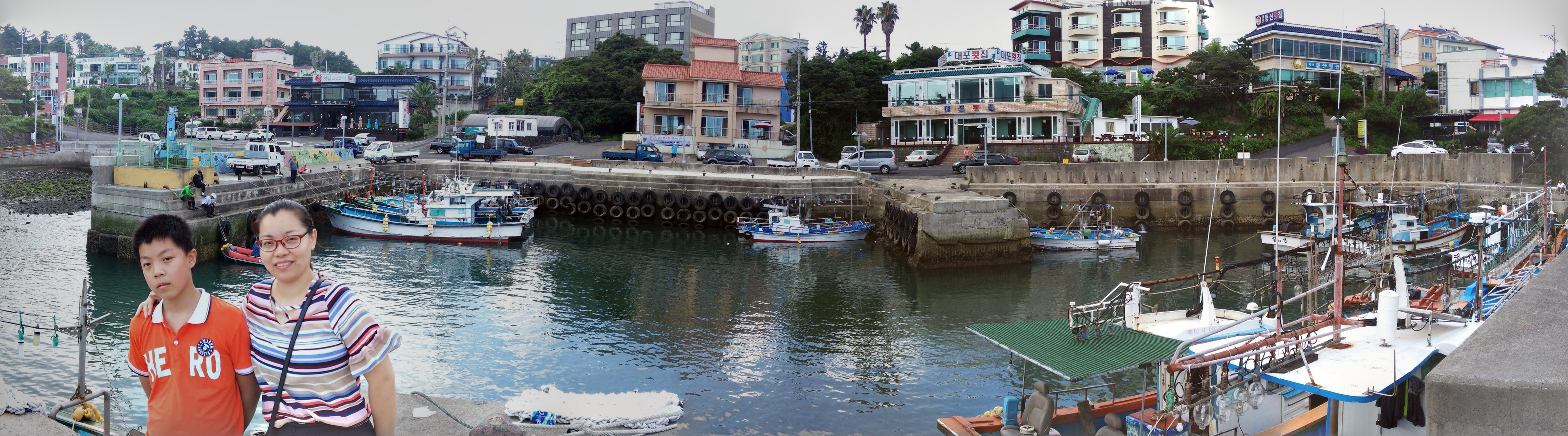 Daepo-ro, Seogwipo-si, Jeju-do, South Korea